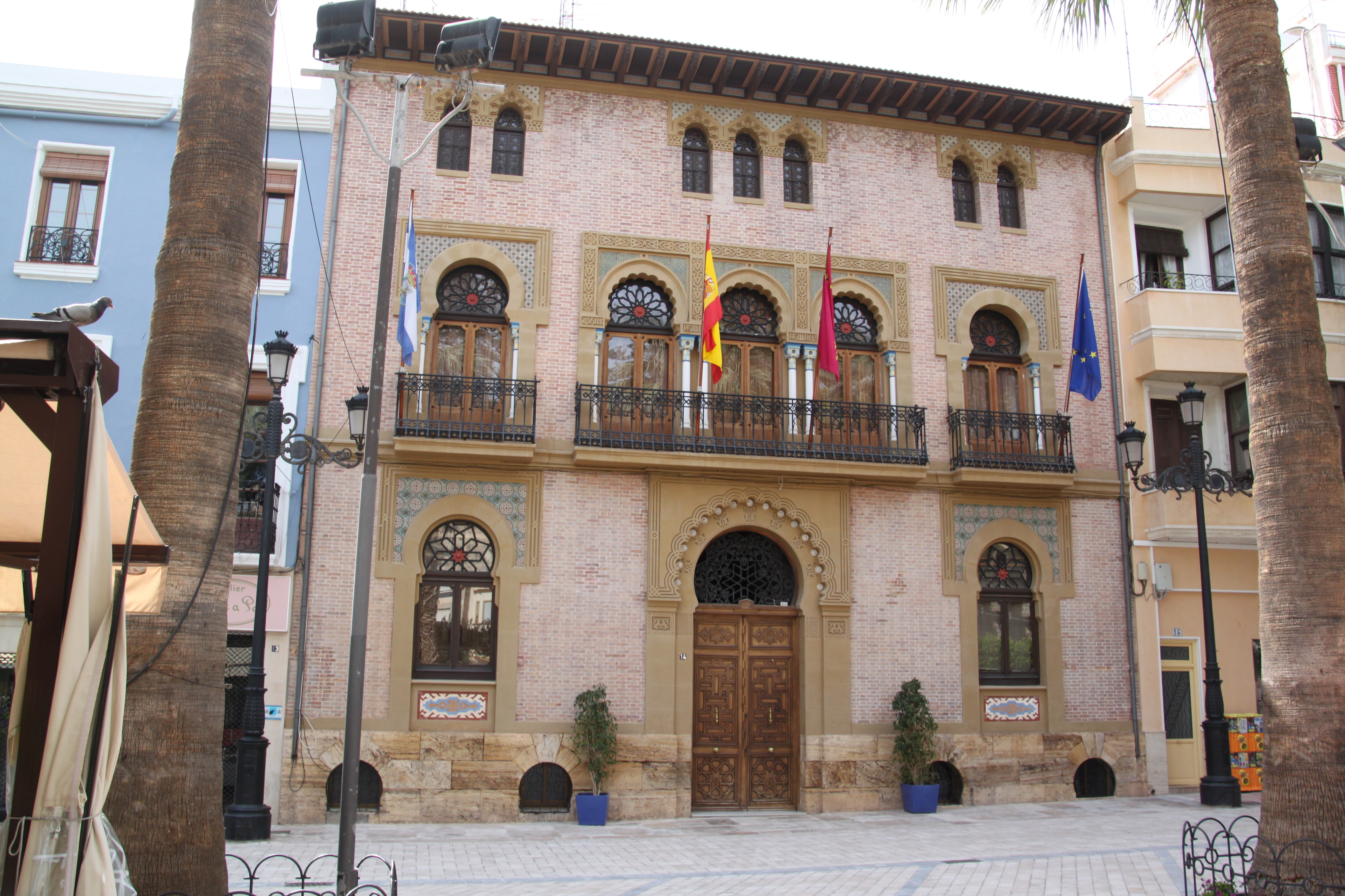 Fachada del ayuntamiento de Águilas (Región de Murcia, España), del siglo XIX y estilo neomudéjar.